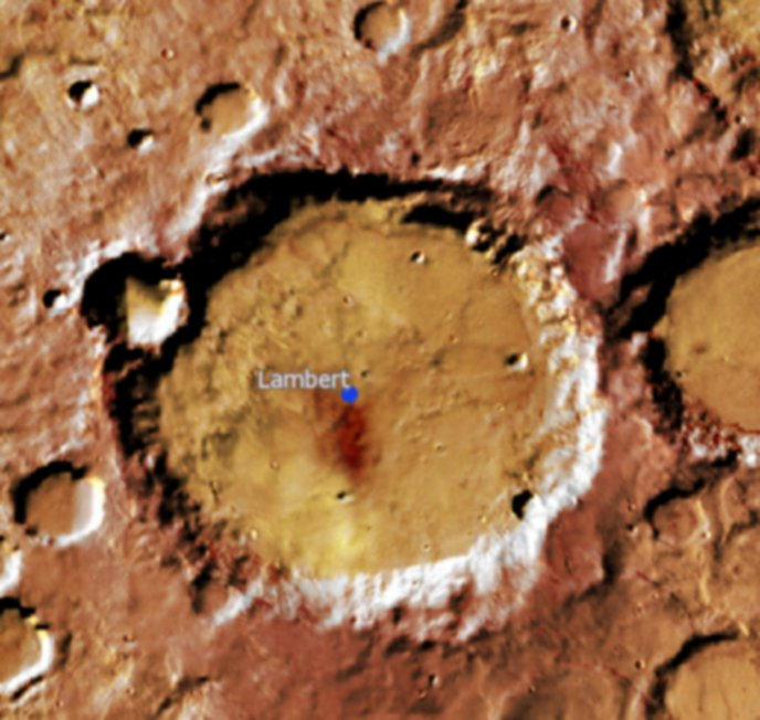 Cráter marciano Lambert. (Imagen IAU/USGS/Goddard/A SU/USGS)